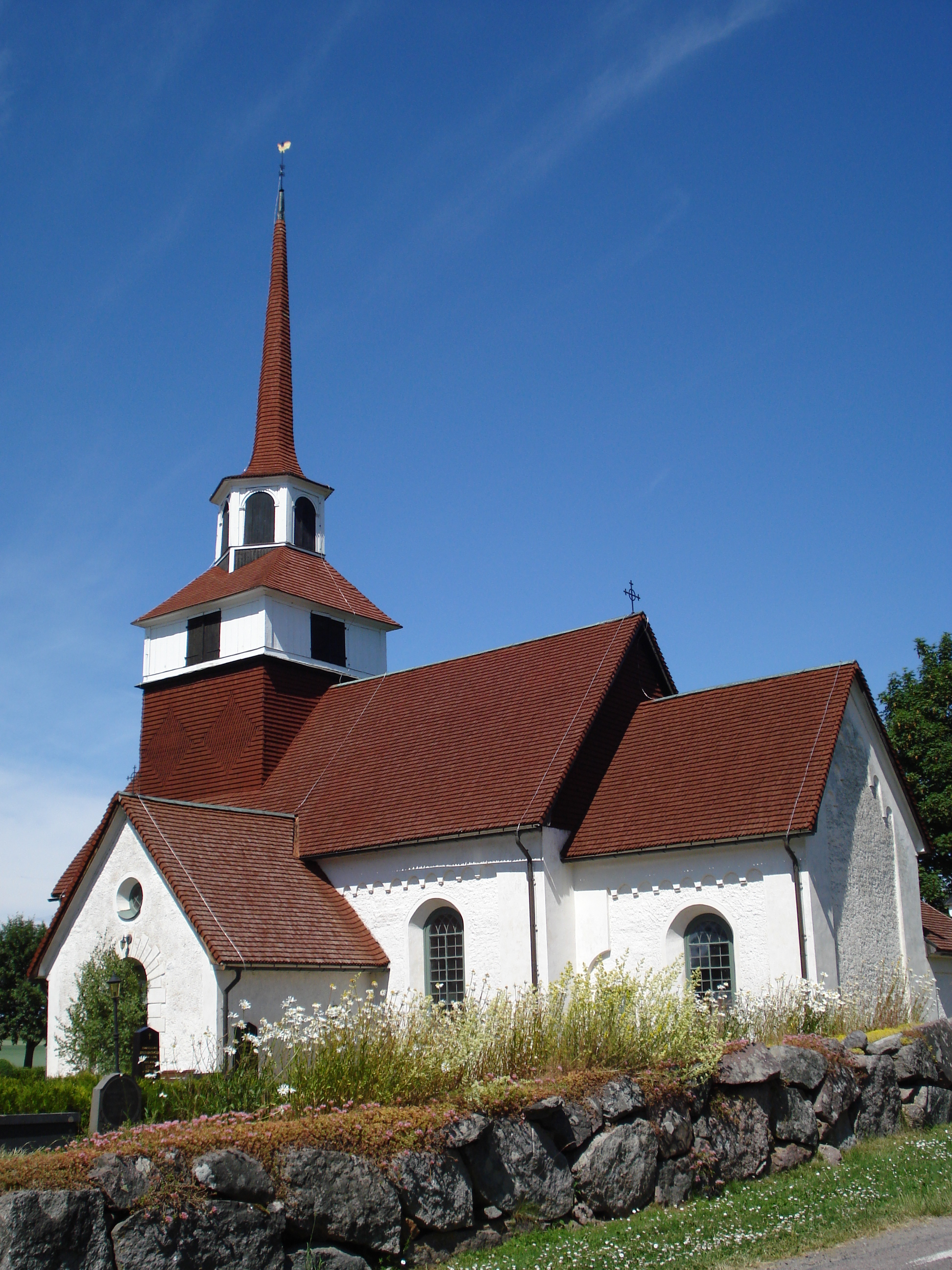 Järstads kyrka